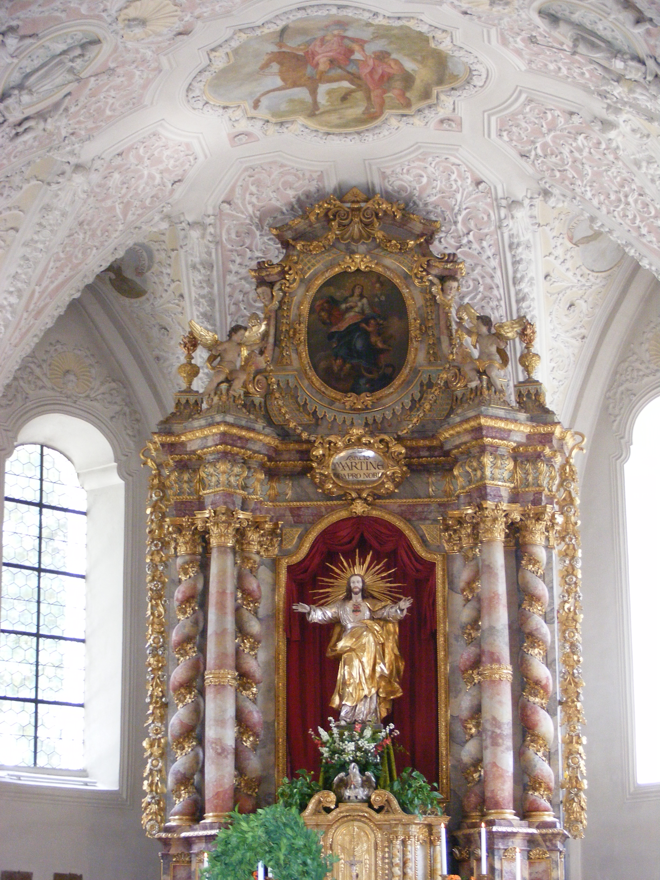 Pfarrkirche St. Martin, Freiherrnstr. 34, 85258 Weichs (Oberbayern): Hochaltar, geschaffen um 1720.